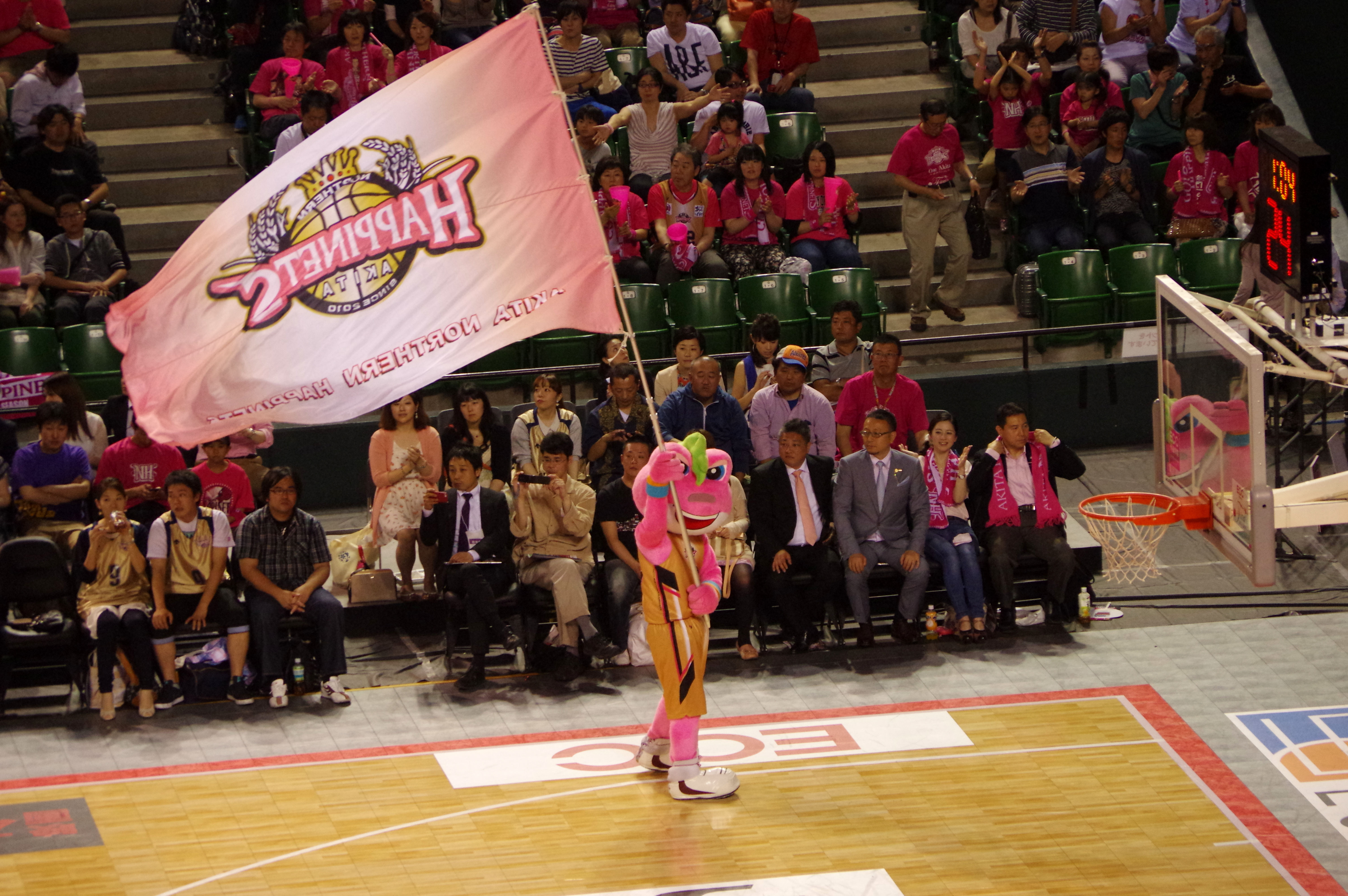 ハピネッツ・マスコット